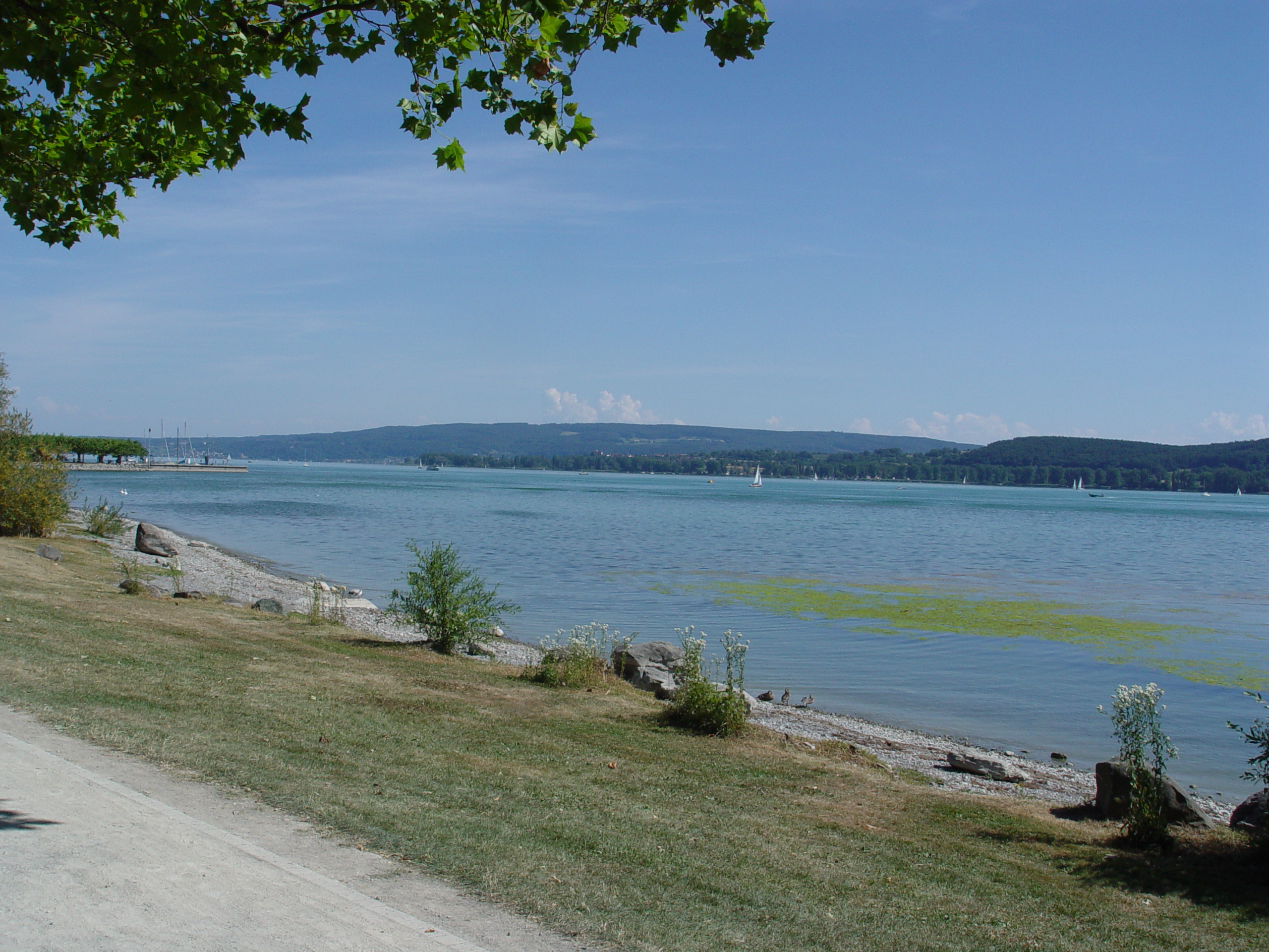 Radolfzell. Bodenseepromenade